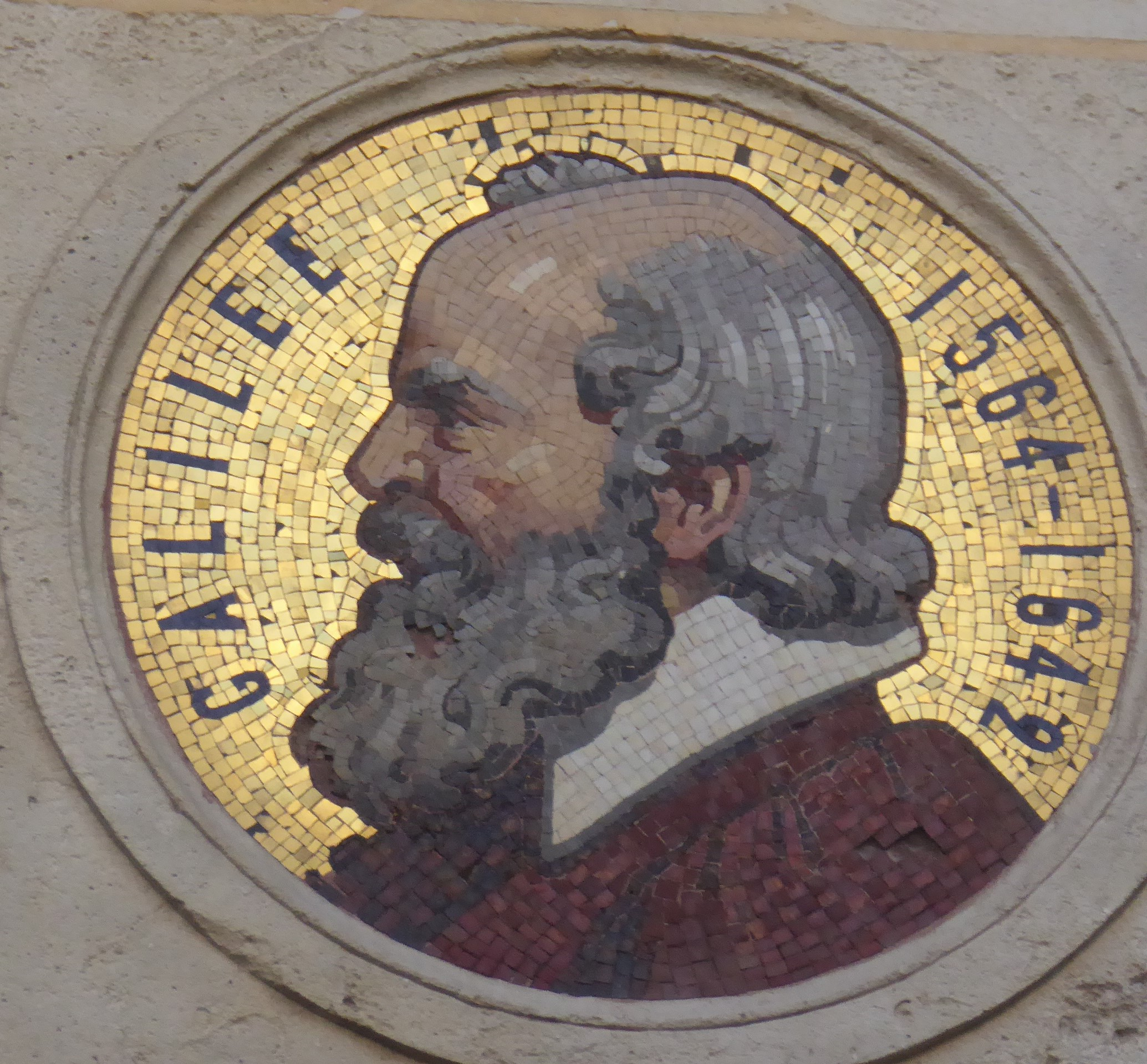 Rue Galilée 9 Médaillon de Galilée